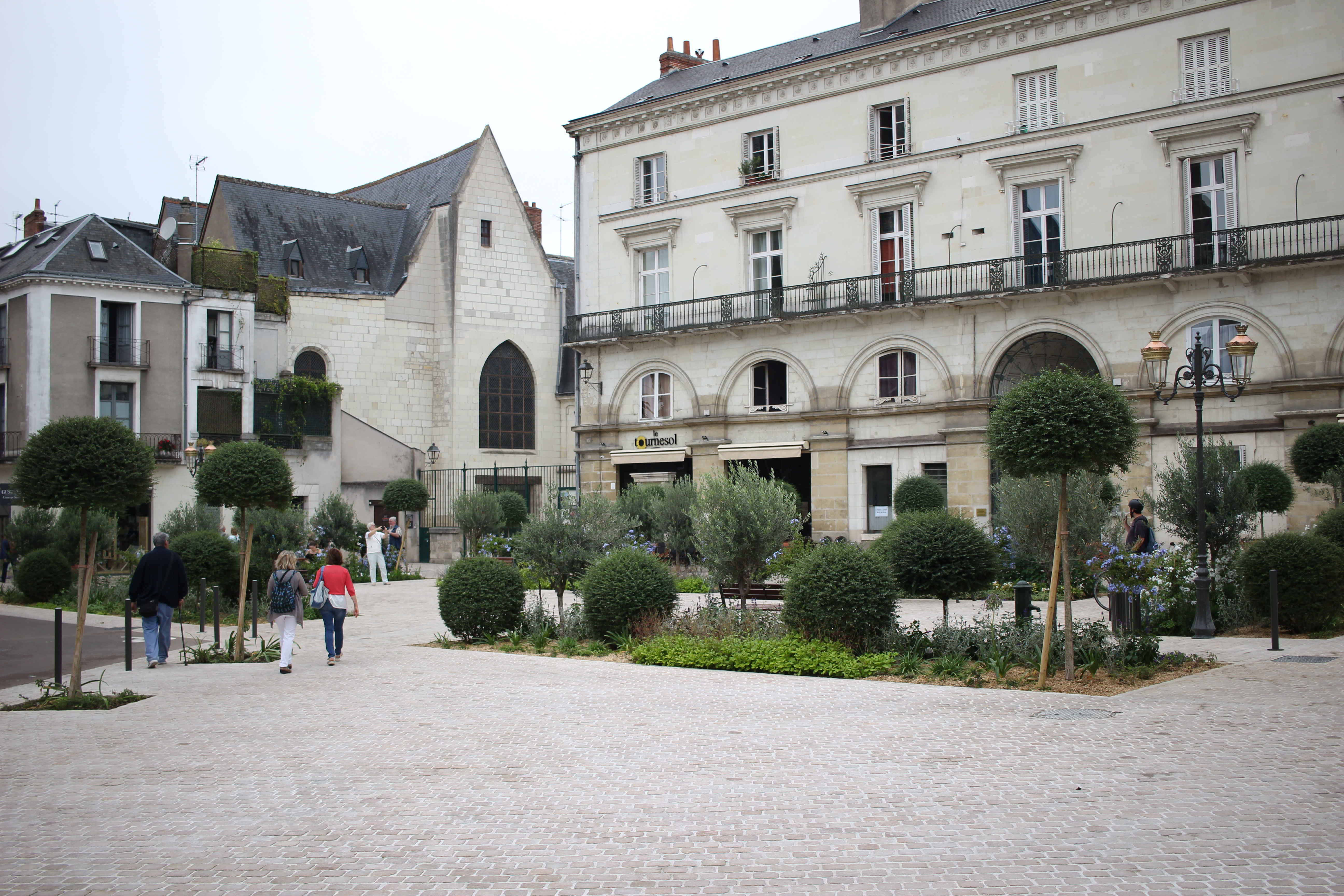 Place de Châteauneuf en 2017, à Tours